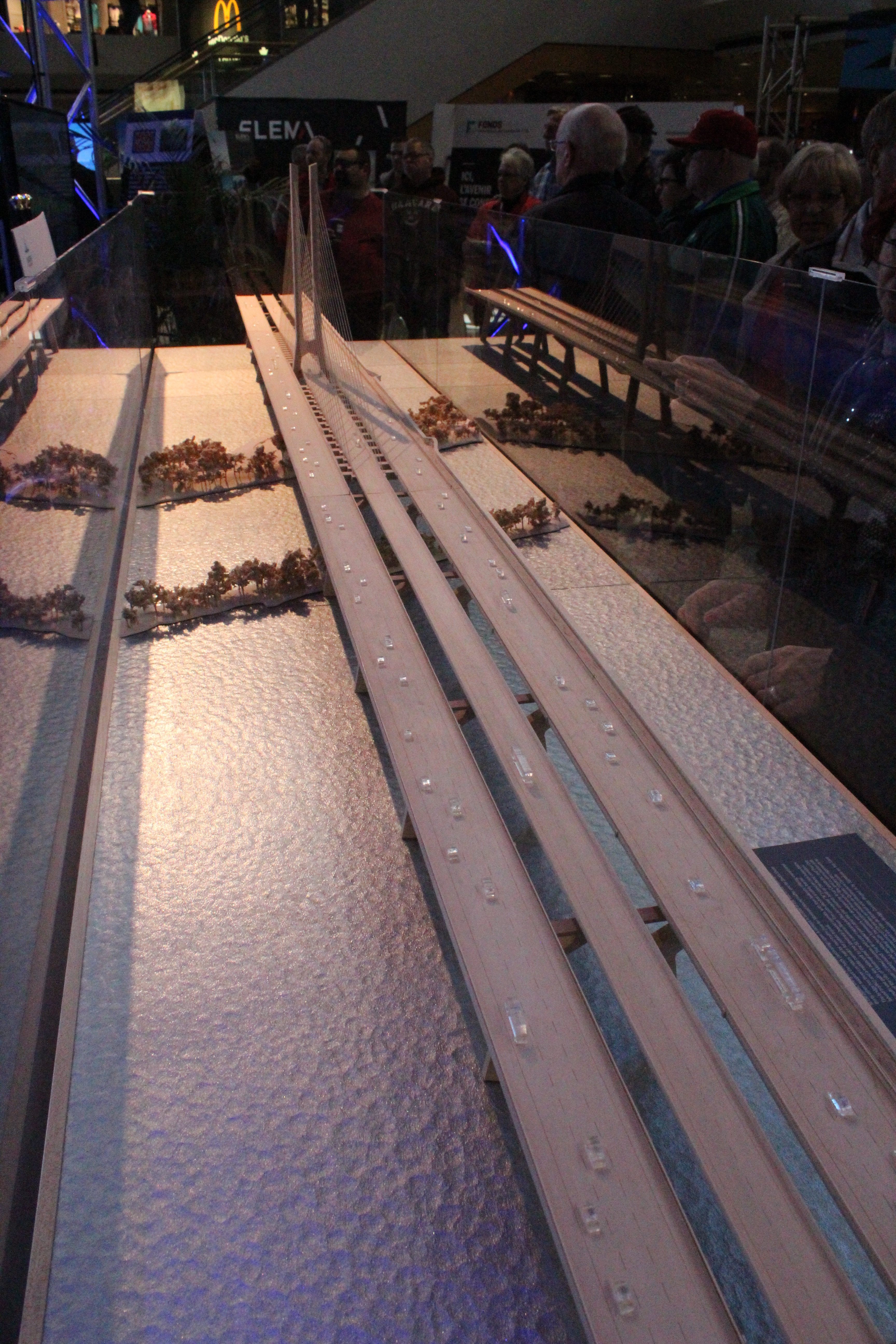 Maquette 1:275 d'une section de un kilomètre du nouveau pont Champlain présentant la section haubanée.